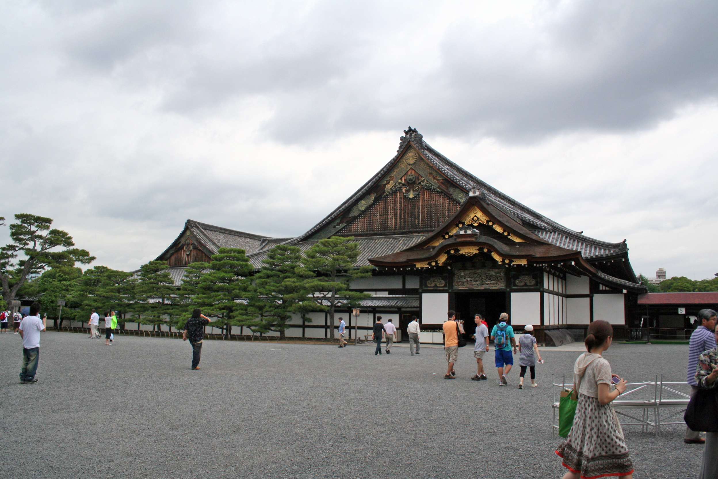 二条城。 二の丸御殿。